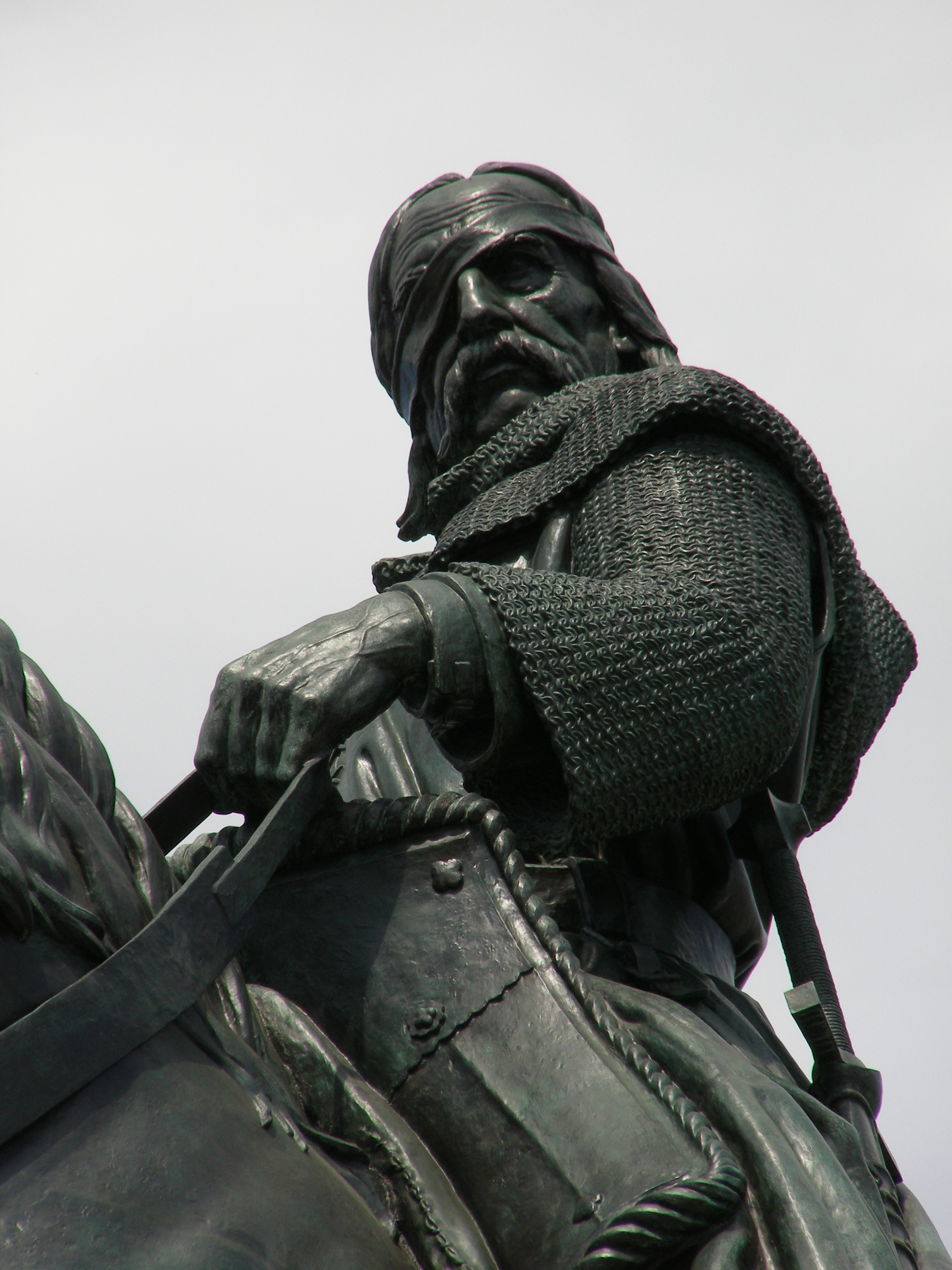 Národní památník na Vítkově, Praha 3, vrch Vítkov 1900, Žižkov